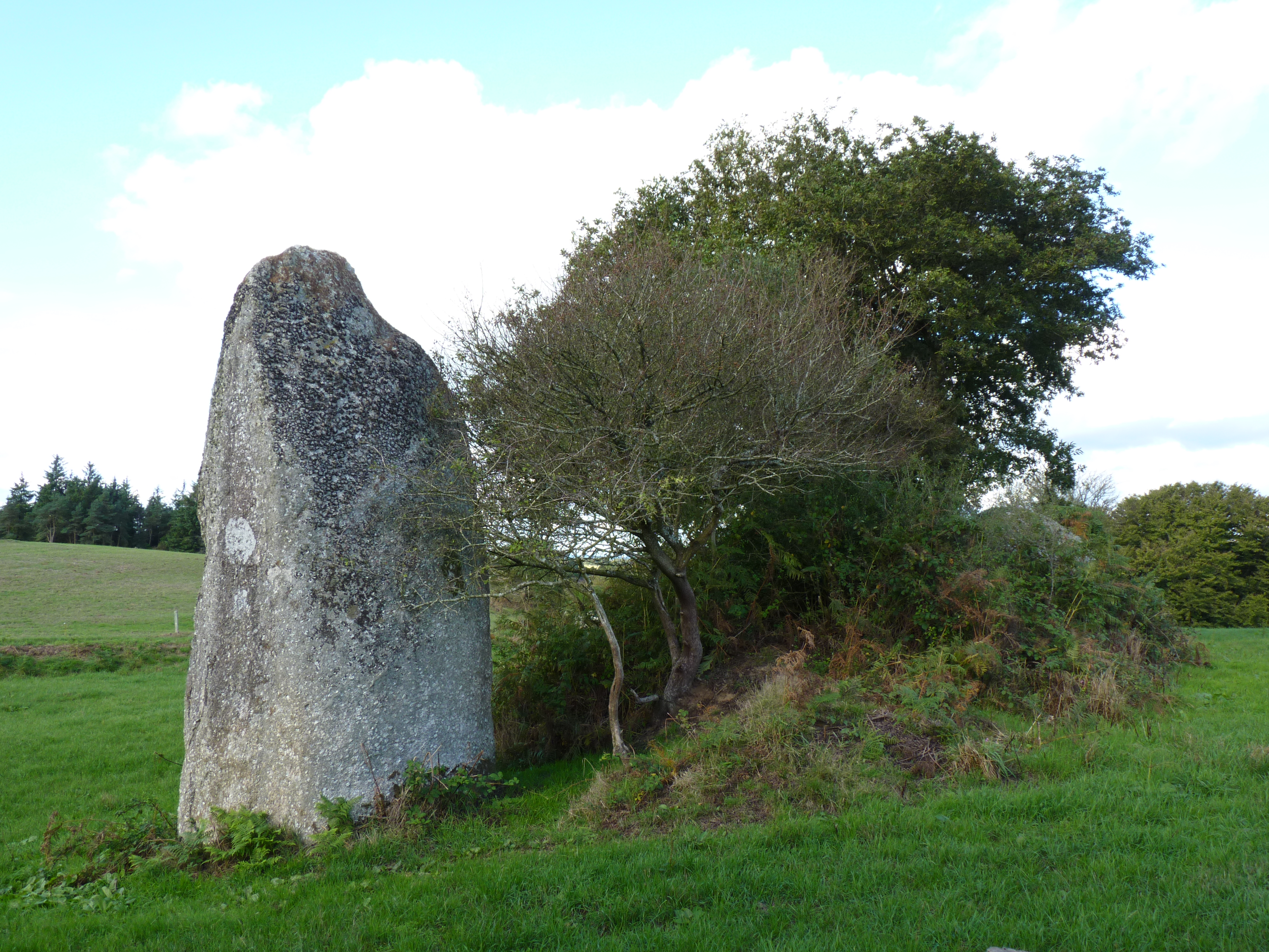 Menhir situé à proximité du menhir christianisé dit croix de Pasquiou.